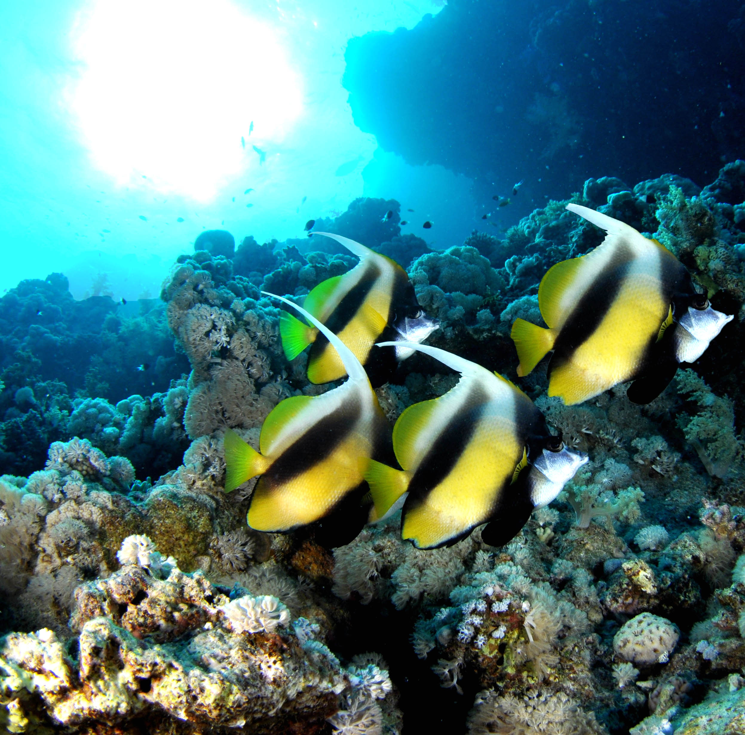 zon in onderwateropname